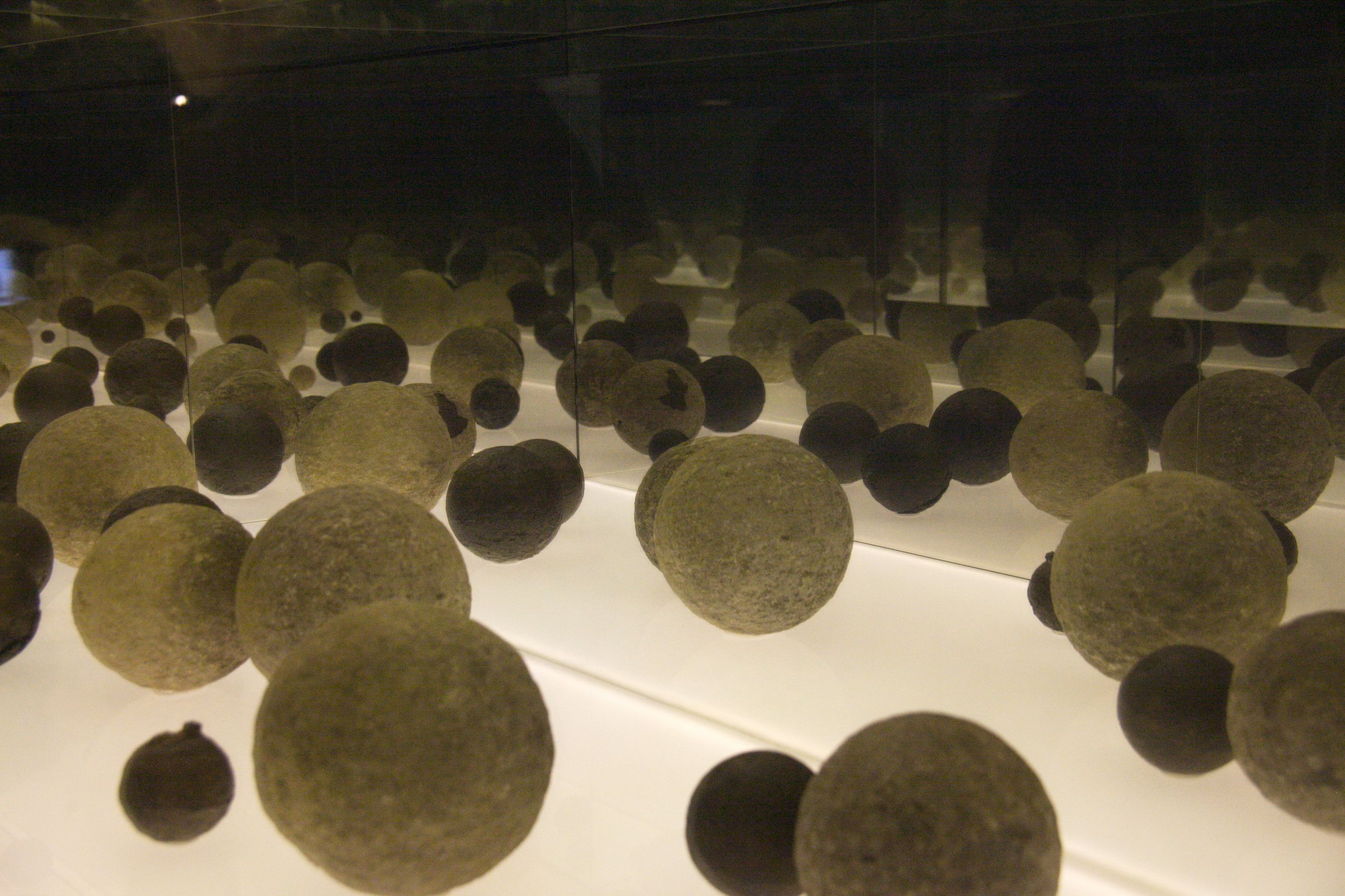 Jaciment arqueològic del Born (Barcelona, 1717). Bales de canó